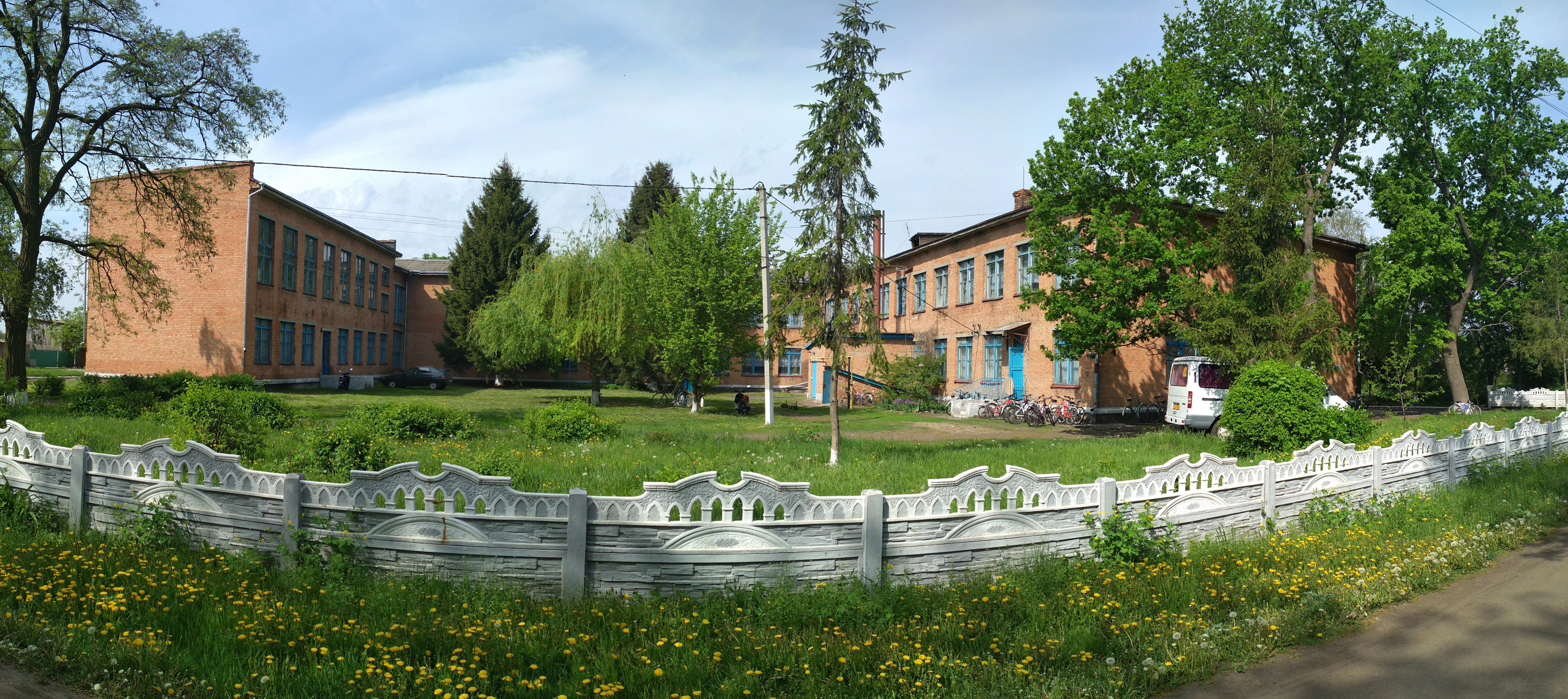 Веселоподільська загальноосвітня школа І-ІІІ ступенів, с Веселий Поділ.